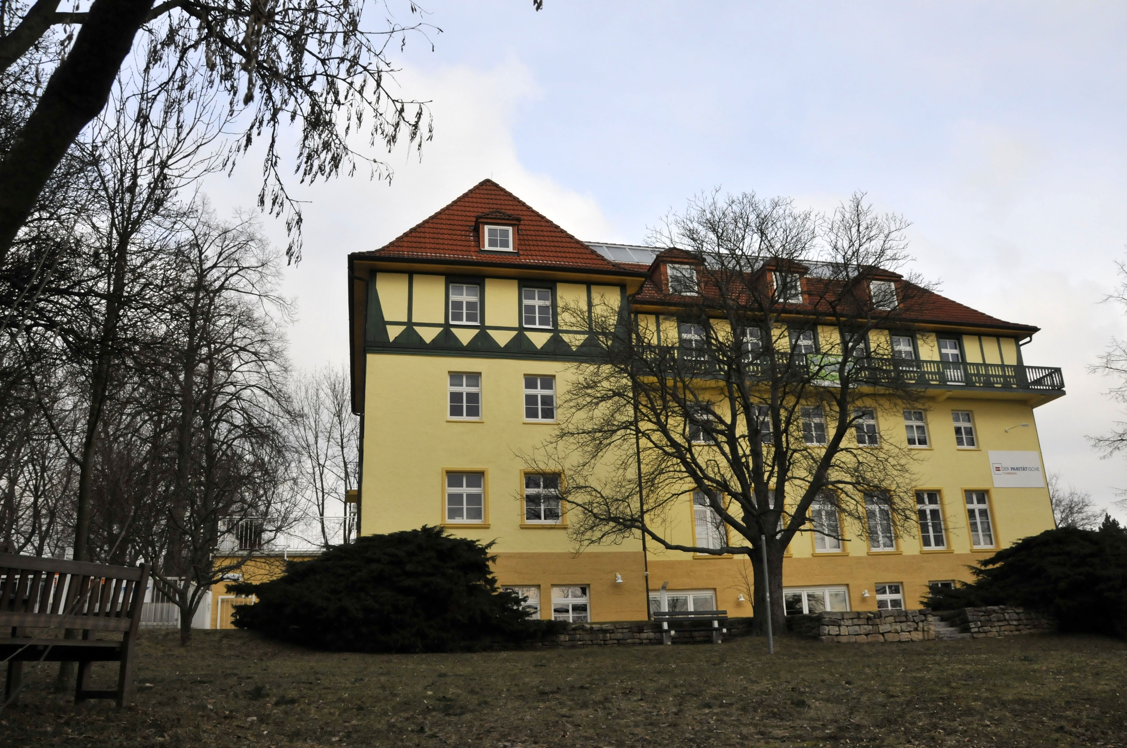 Neudietendorf, Haus des Paritätischen Wohlfahrtsverbandes